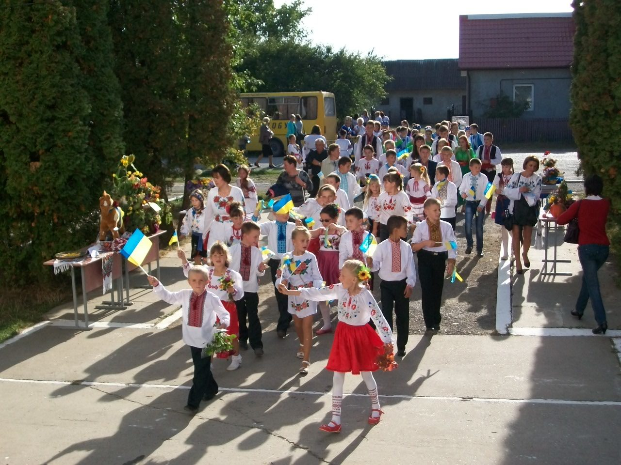 Шманьківці